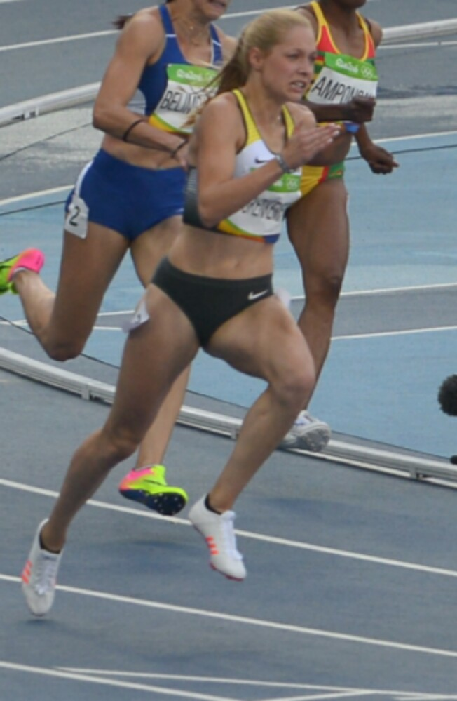 4ème Série du 200m féminin de Rio 2016.